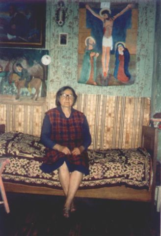 Malarka Marianna Wiśnios